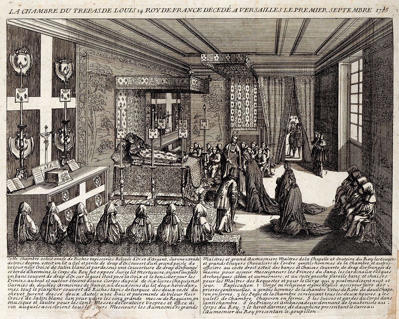 Gravure de 1715 représentant la mort de Louis XIV.